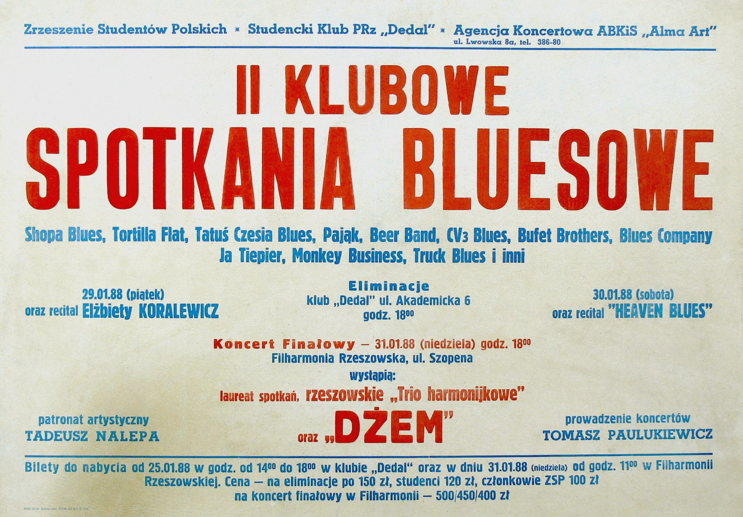 Spotkania